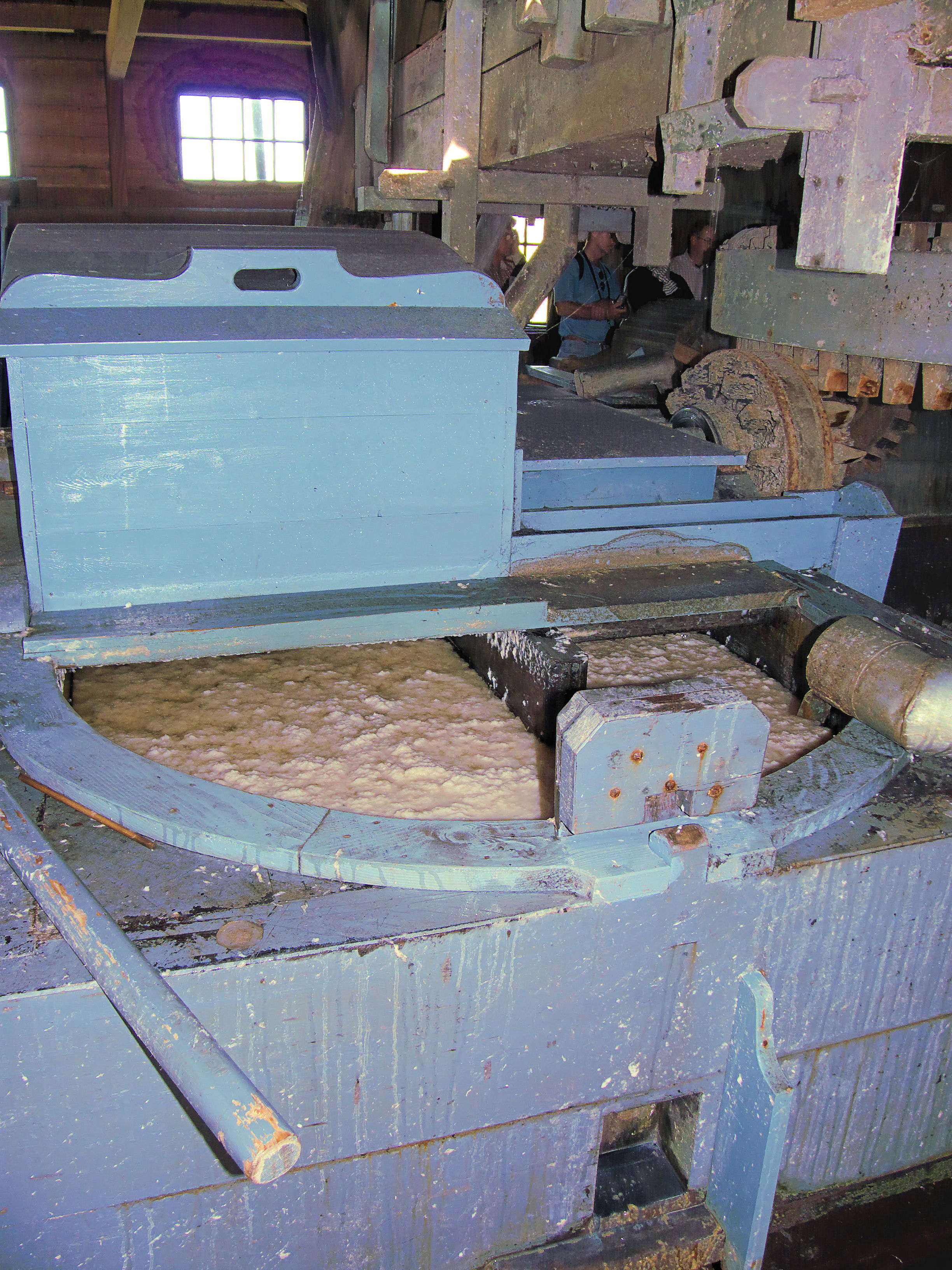 De Schoolmeester maalbak